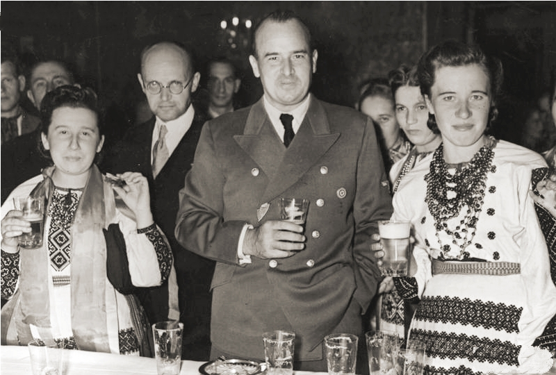 Gubernator Hans Frank z członkami ukraińskiej delegacji dożynkowej przy stole na Zamku Królewskim w Krakowie. SM0 2-2923